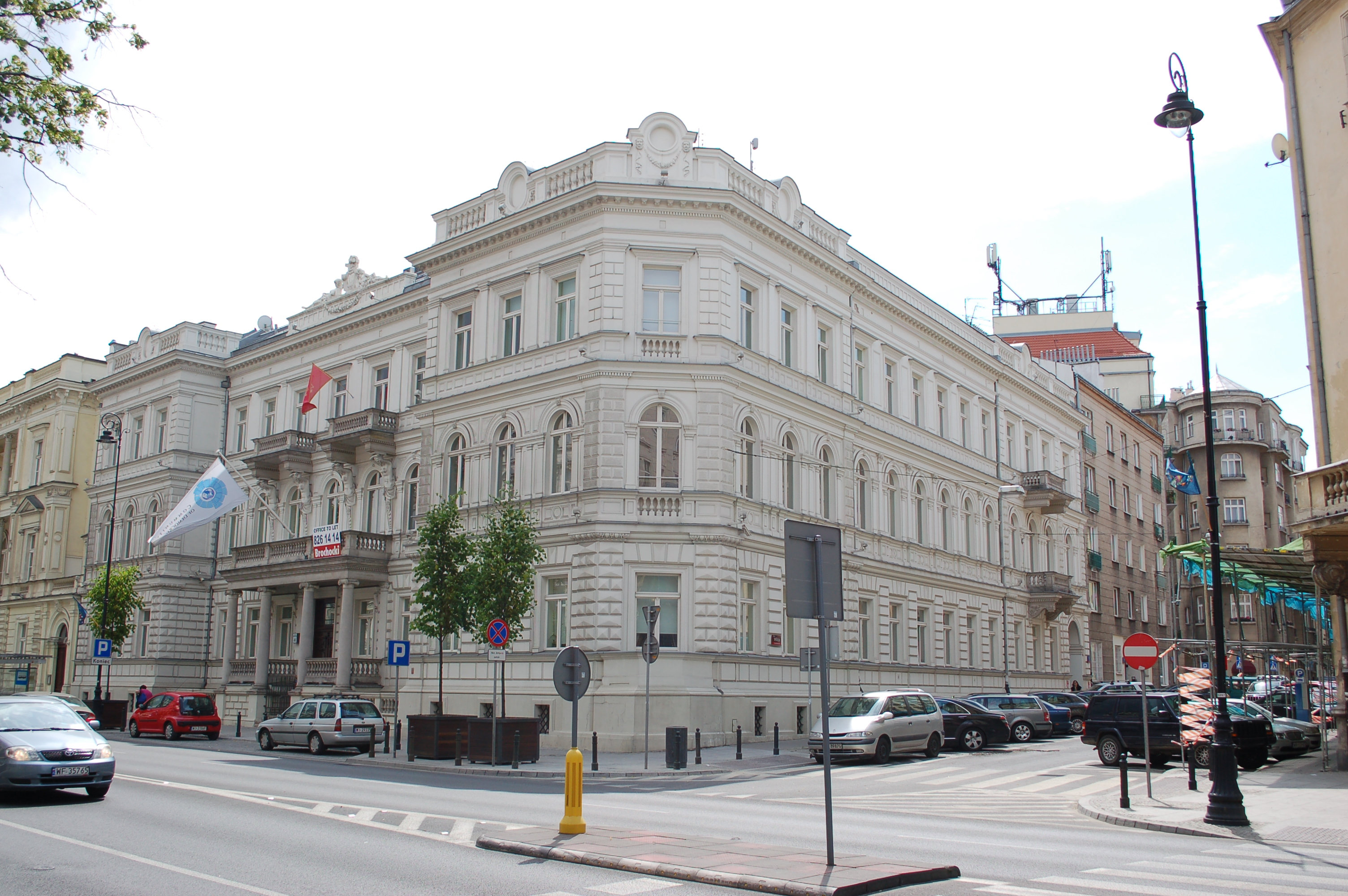 Warschau